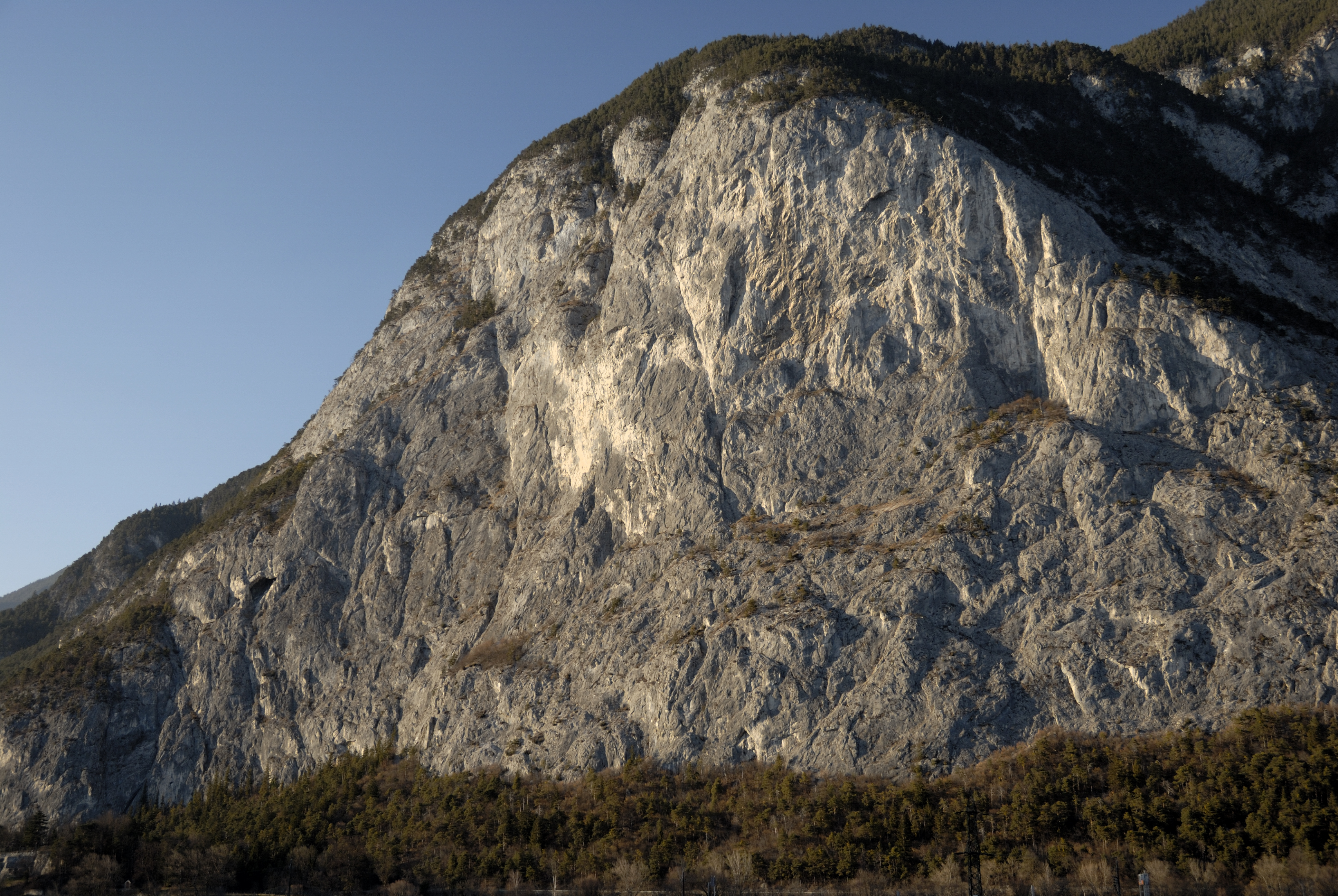 Martinswand bei Kematen in Tirol